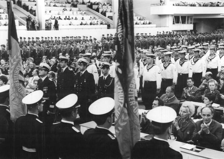 ADN-ZB Kollektiv 16.6.1971-bi-Berlin: VIII. Parteitag der SED. Abschließender Höhepunkt des zweiten Beratungstages war der Einmarsch der NVA-Delegation (Reporter Koard, VIII-B)